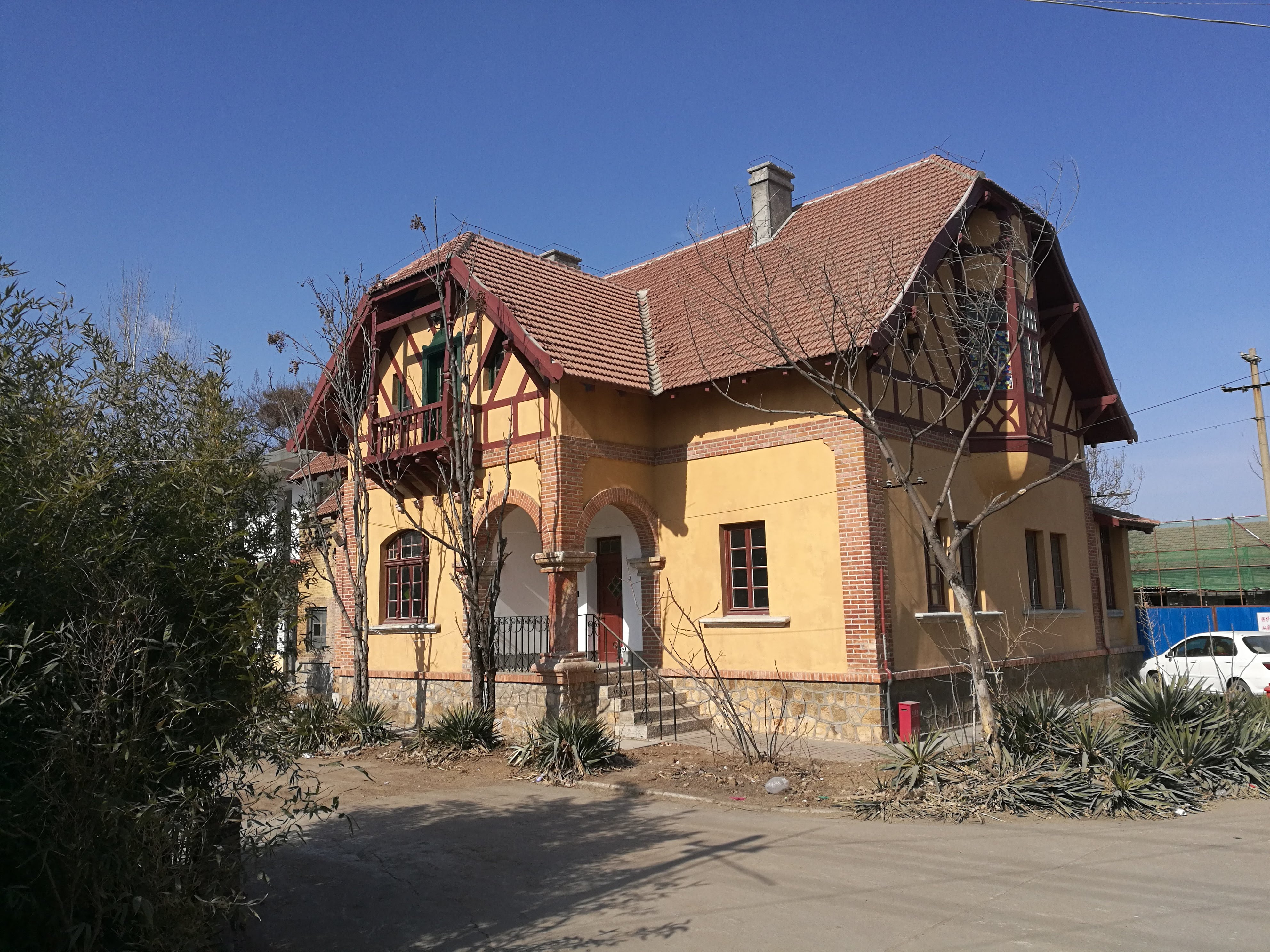 坊子德日建筑群中的德军司令部旧址